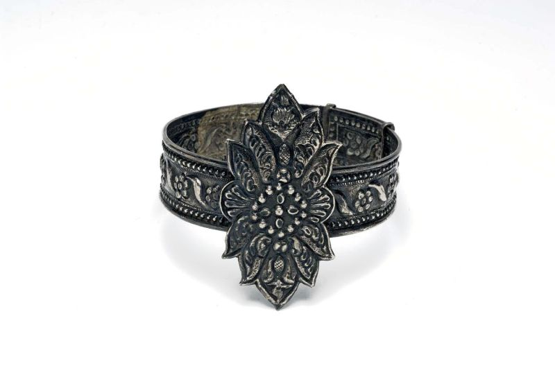 Armsieraad. Zilveren armband, gebruikt door danseressen tijdens wajangvertoningen